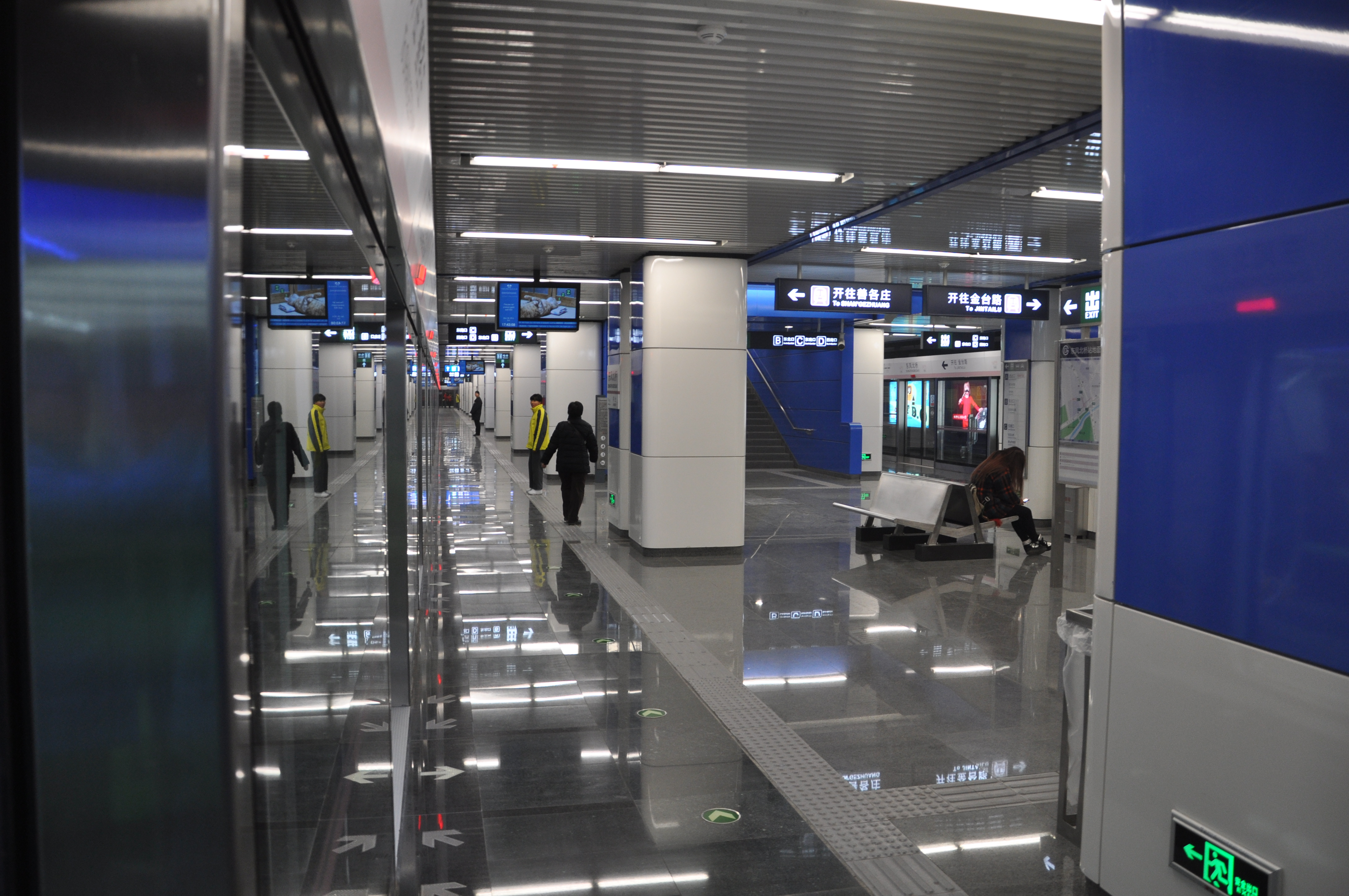 北京地铁14号线东风北桥站站台